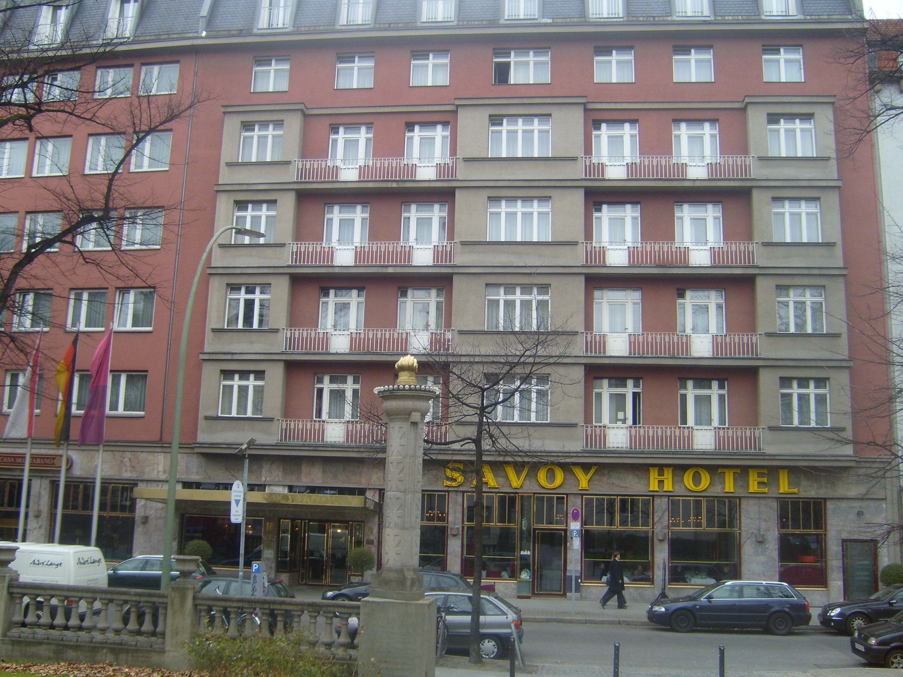 Savoy Hotel in der Fasanenstr. in Berlin Charlottenburg. (Standort vor dem Delphi-Kino, Blickrichtung Westen)